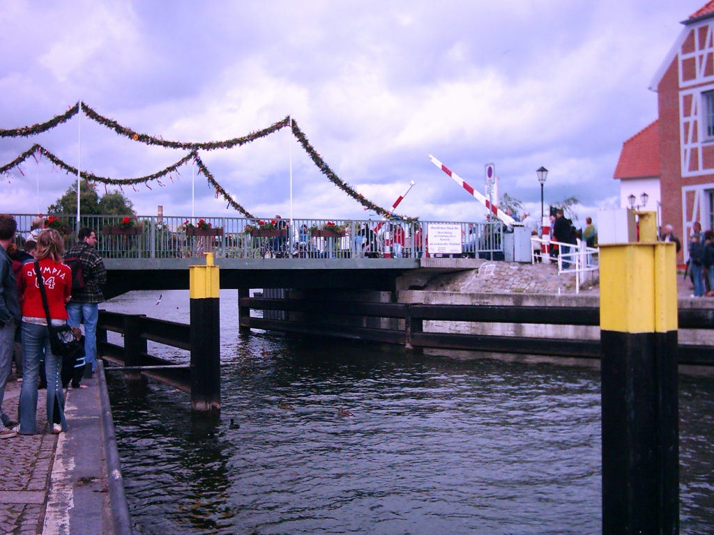 Drehbrücke in Malchow, Schranke schließt